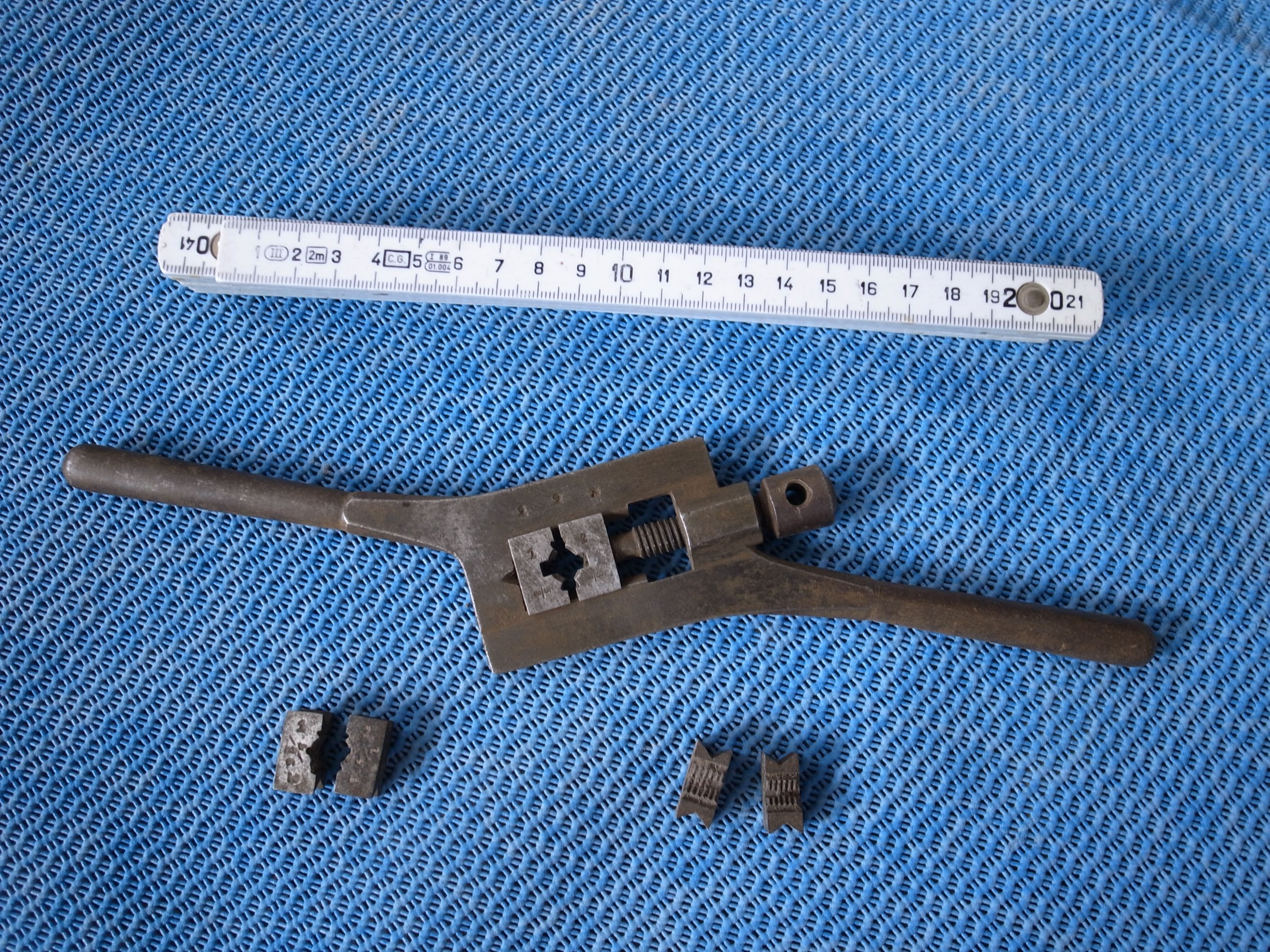 einstellbare Schneidkluppe mit austauschbaren Schneidwerkzeugen für Whitworth-Gewinde, ca. 1925